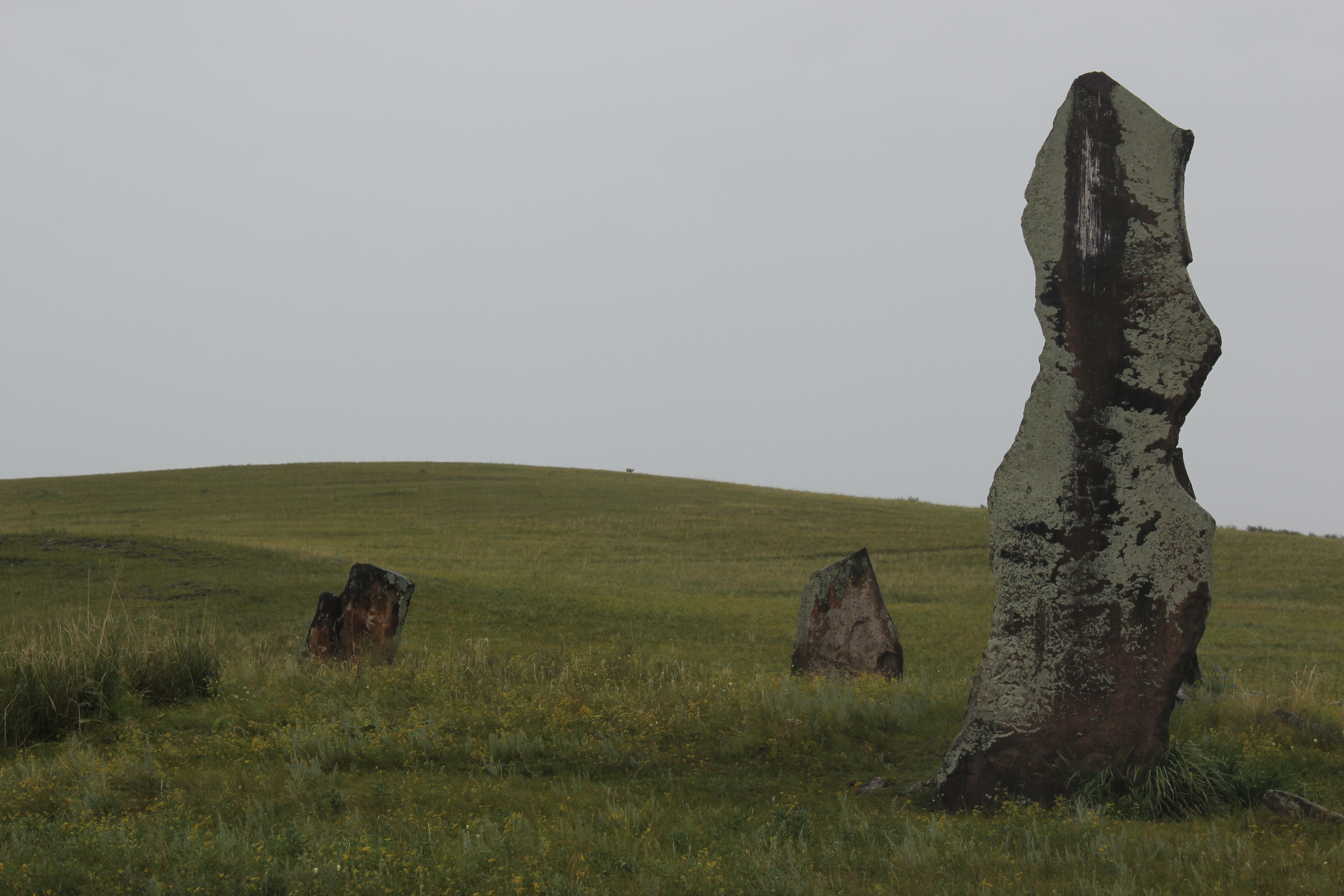 Софроновский могильник